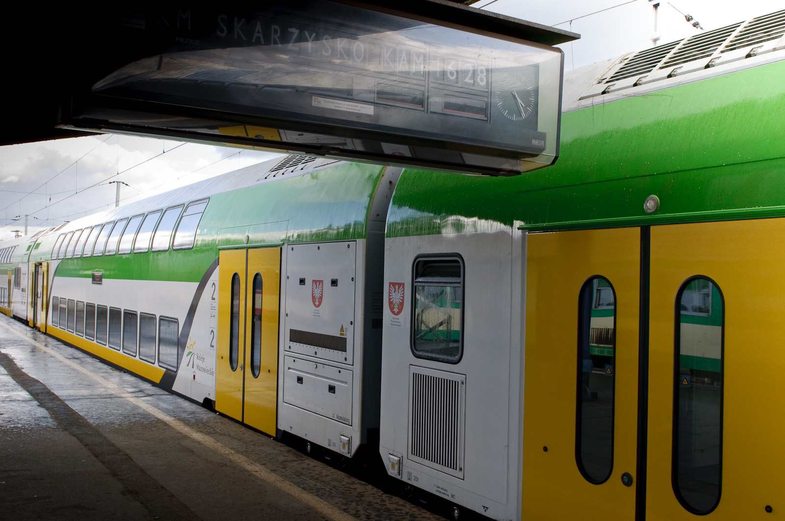 Pociąg Kolei Mazowieckich odjeżdżający z Warszawy Wschodniej do Skarżyska Kamiennej.